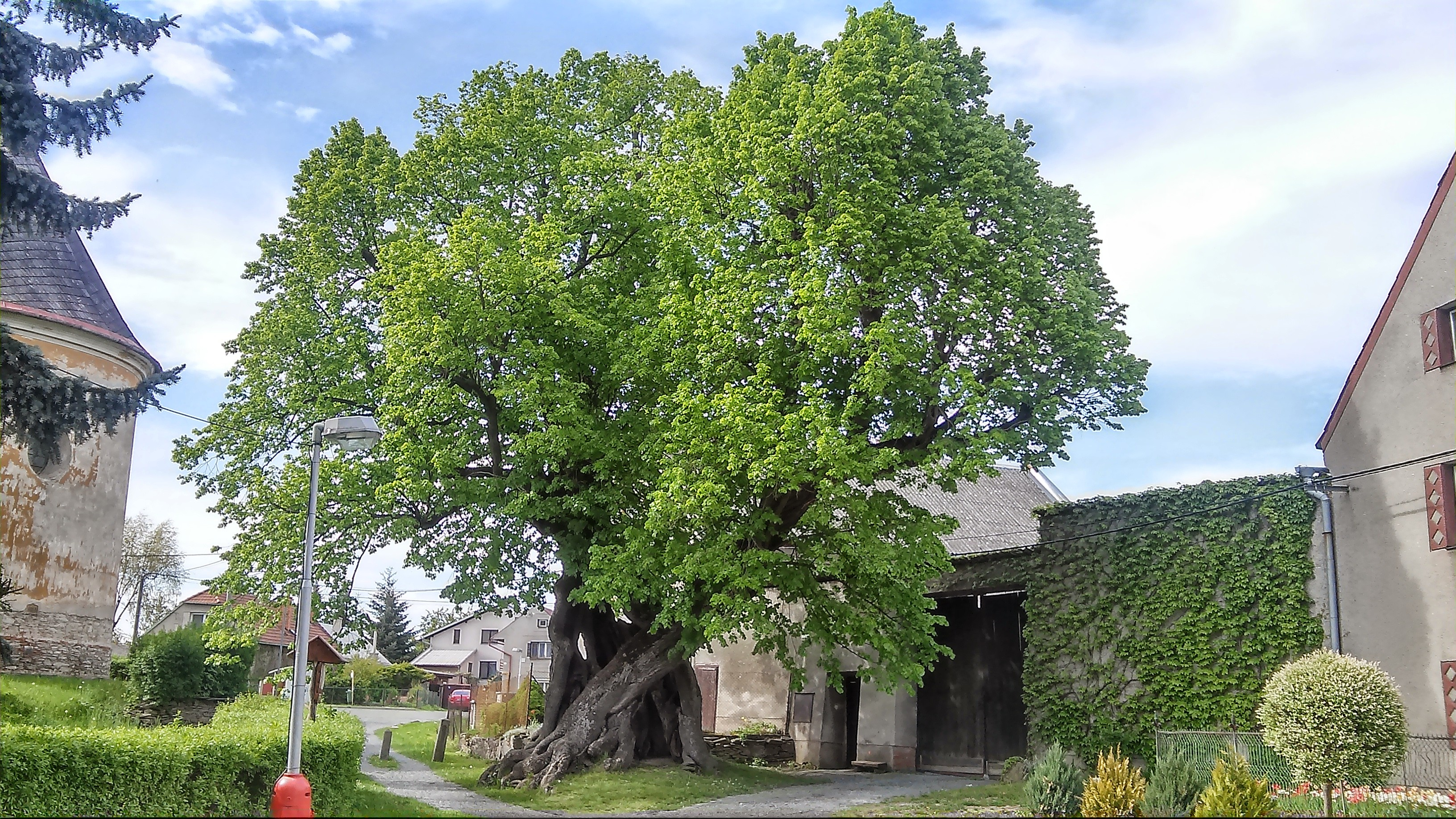 Mladějovická lípa u kostela